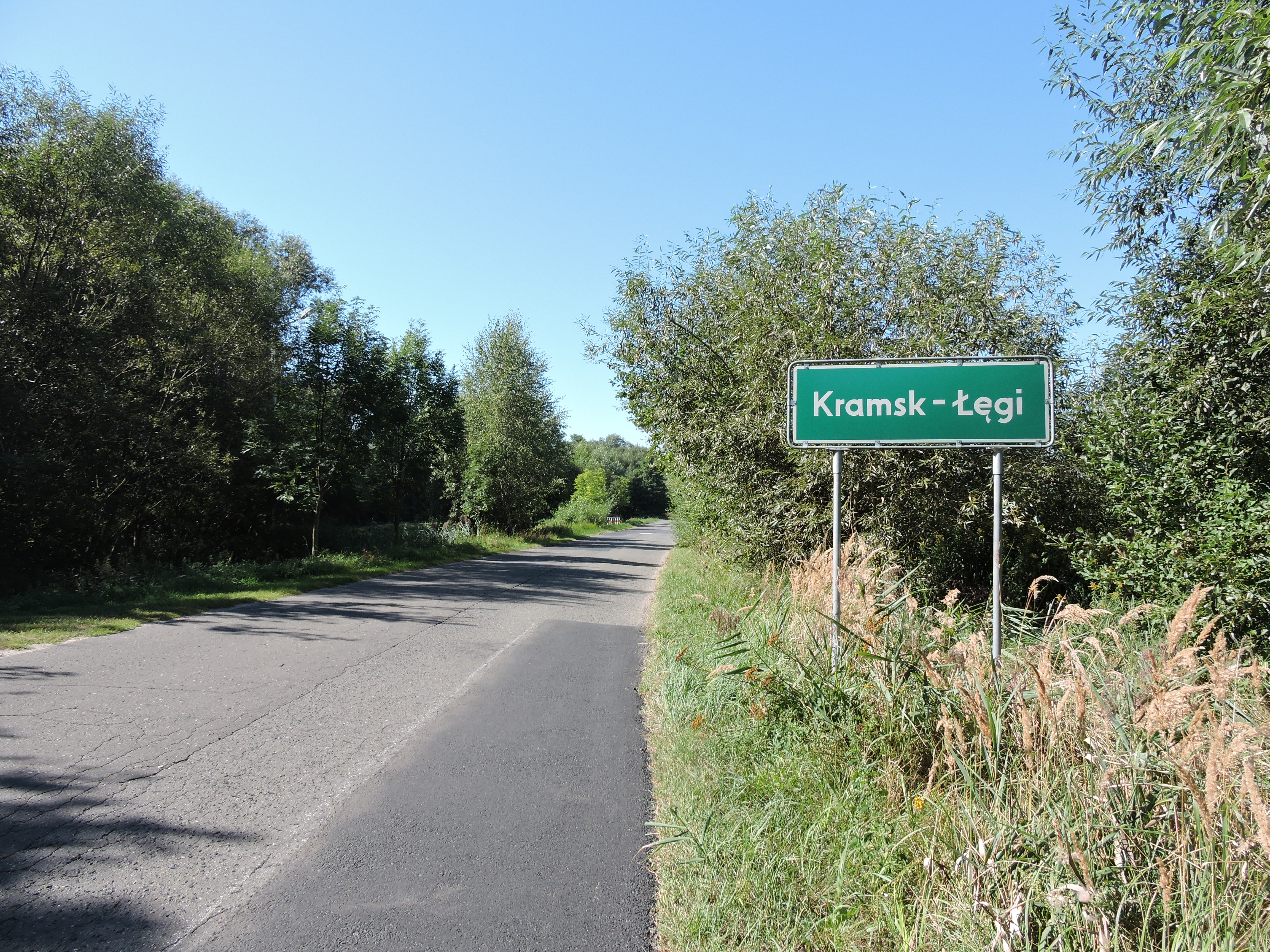 Wjazd do starszej części wsi od Strumyka